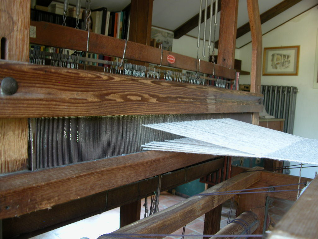 foto mia personale, pettine con ordito, 2007 Licensing Categoria:Immagini sulla tessitura